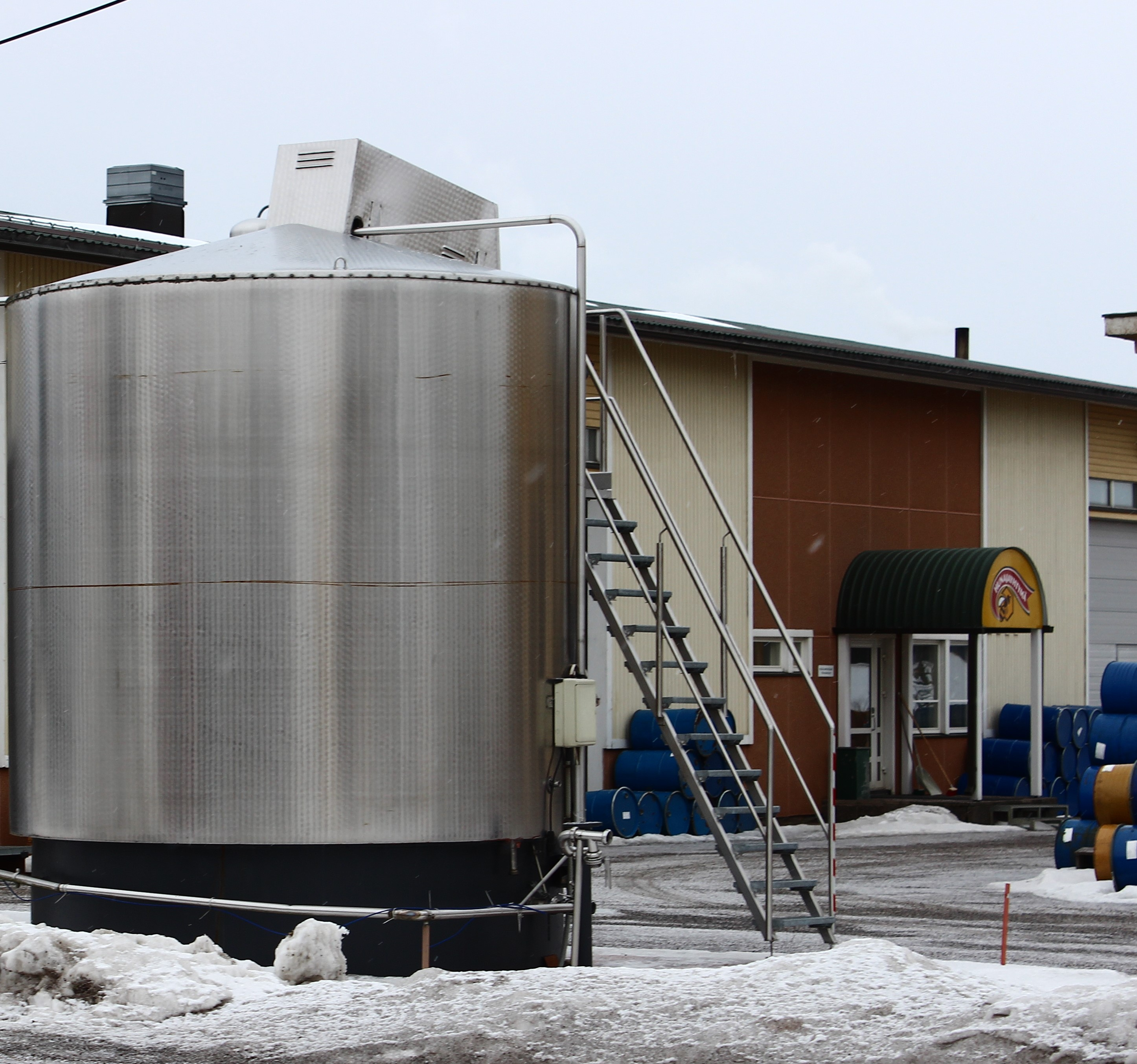 Hunajayhtymän toimipaikka Loimaala